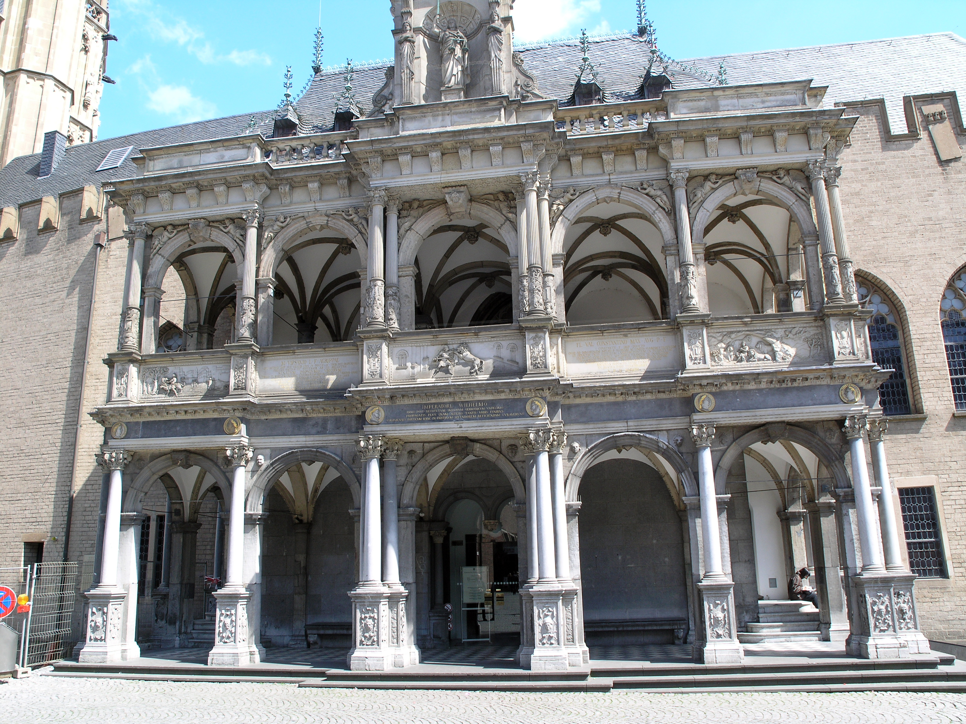 Северный Рейн-Вестфалия, Кёльн - ратуша